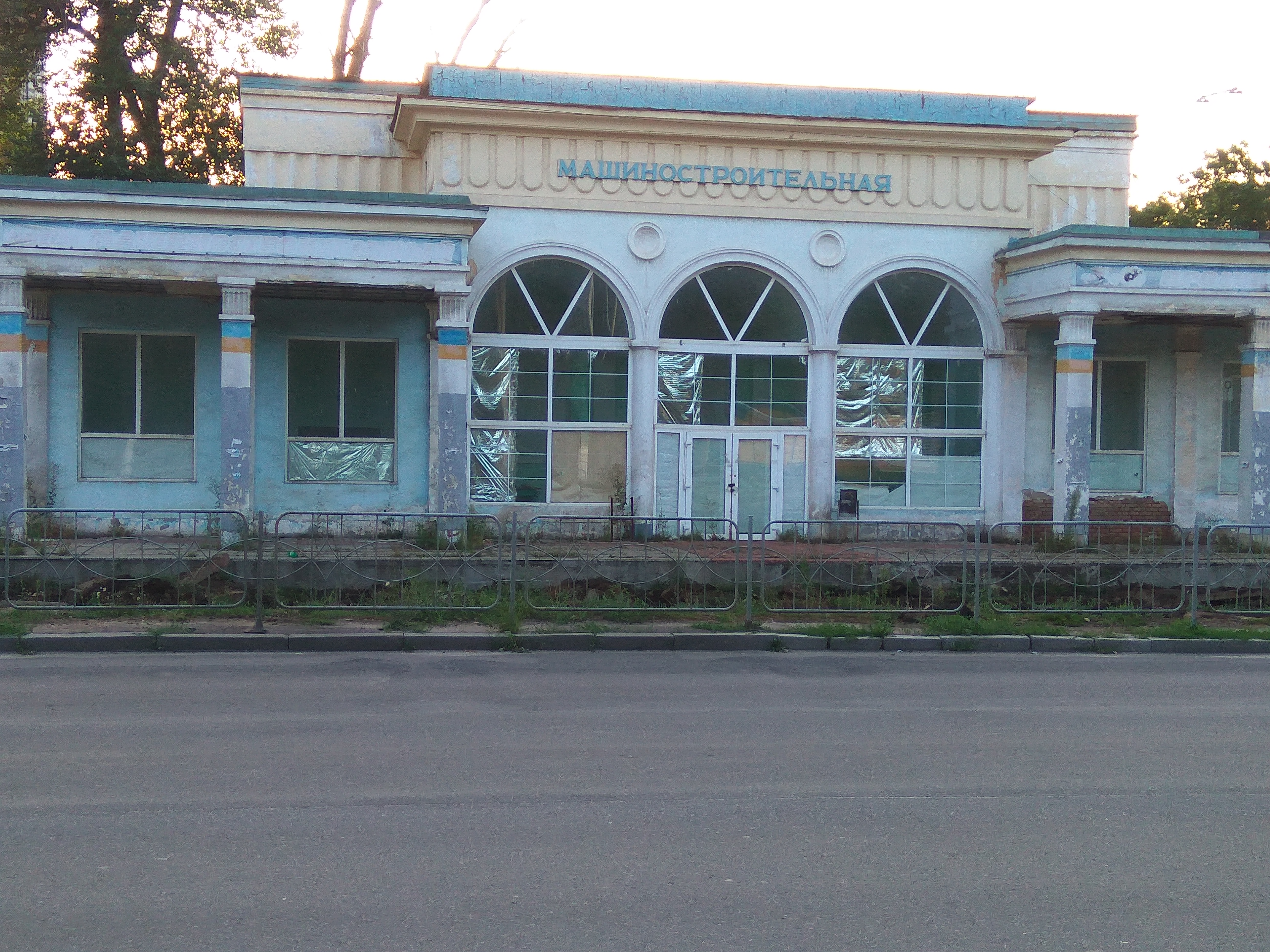 Колишня трамвайна станція у Краматорську